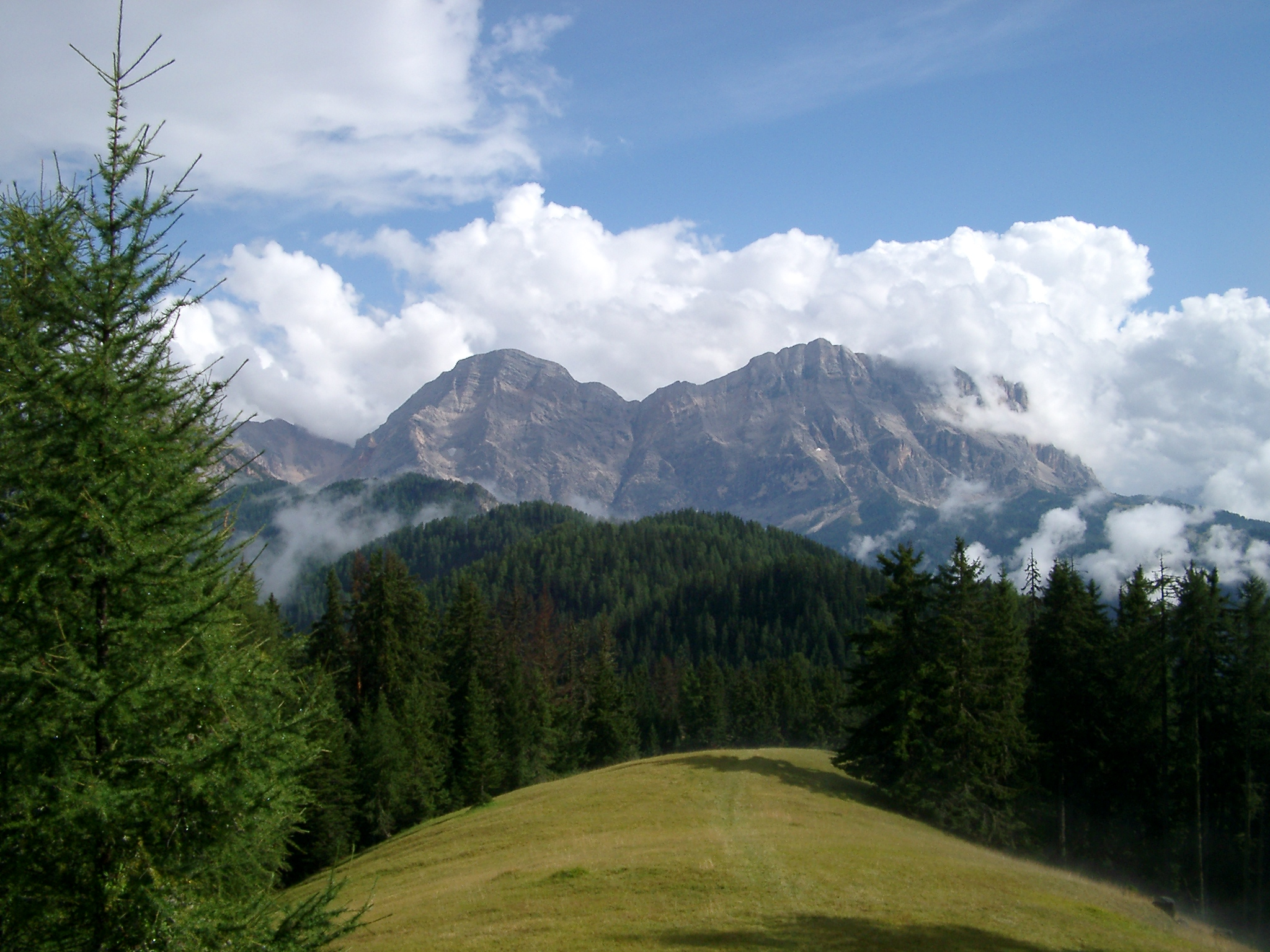 Neuner und Zehner von der Corspitze aus in Wengen (Südtirol)